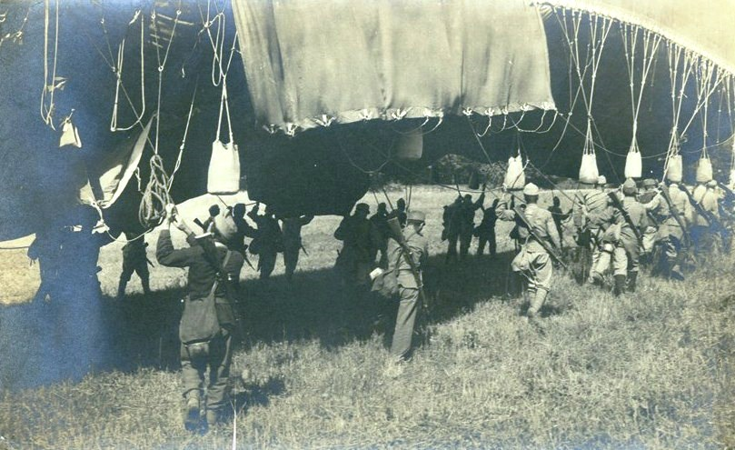 Снимка от пренасянето на военен балон на австро-унгарската армия от мястото на пълнене с газ към мястото за издигане.